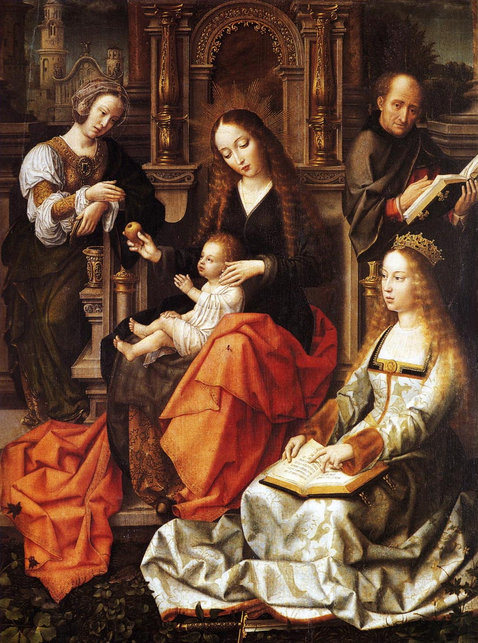 Posible imagen de Isabel la Católica, reina de Castilla (о Santa Catalina de Alejandría)